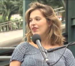 A cantora e compositora brasileira Alice Caymmi.